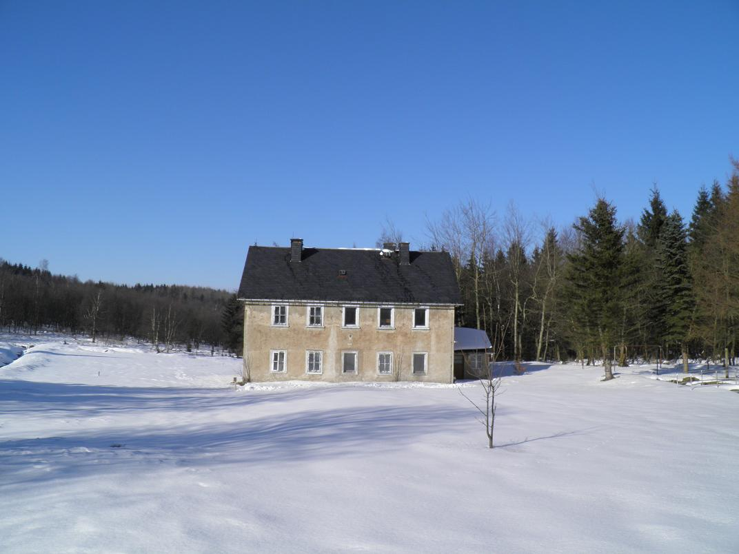 Bad Einsiedel, ehem. Badehaus im Winter 2014/15